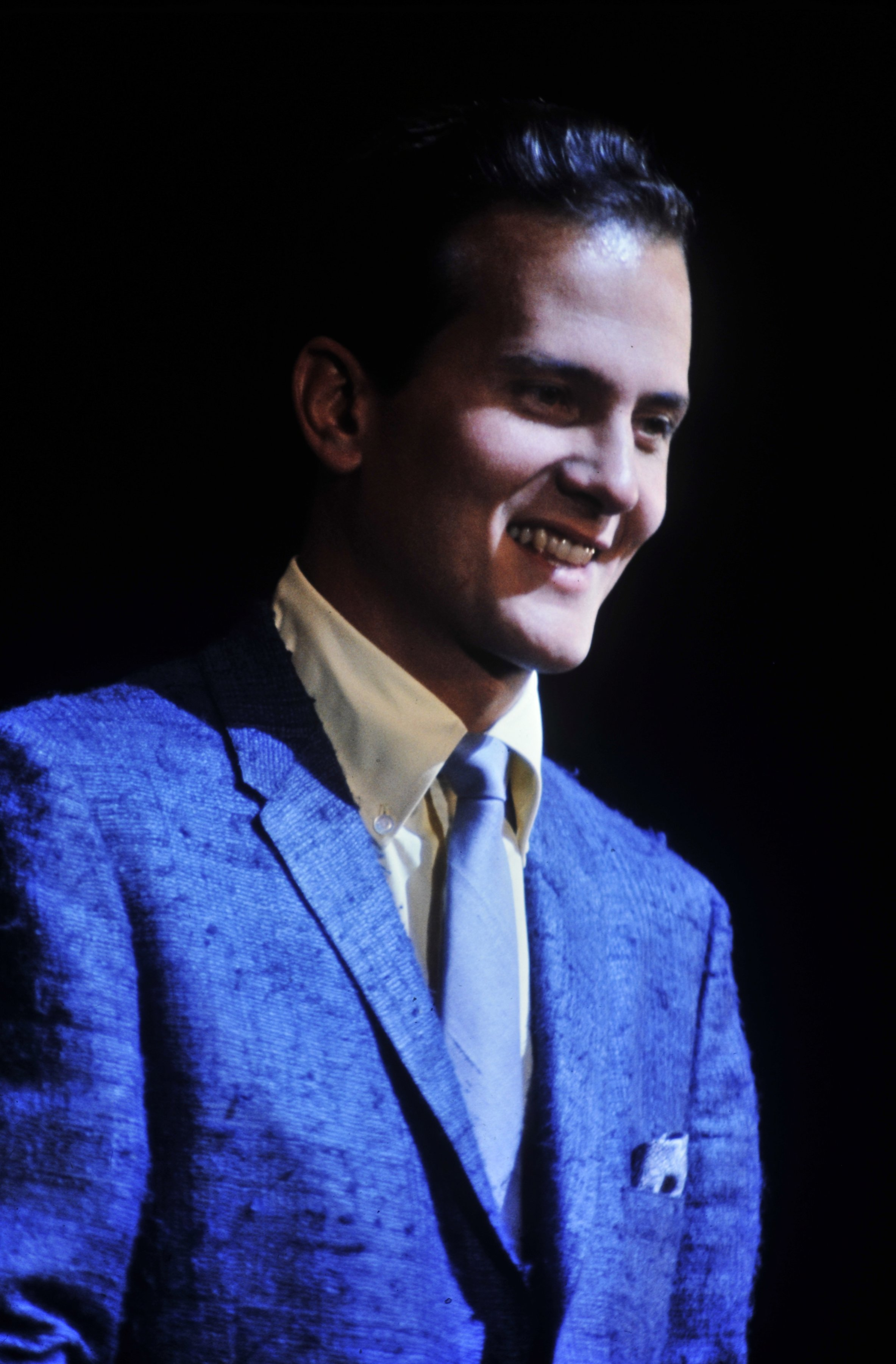 Récital de Pat Boone.